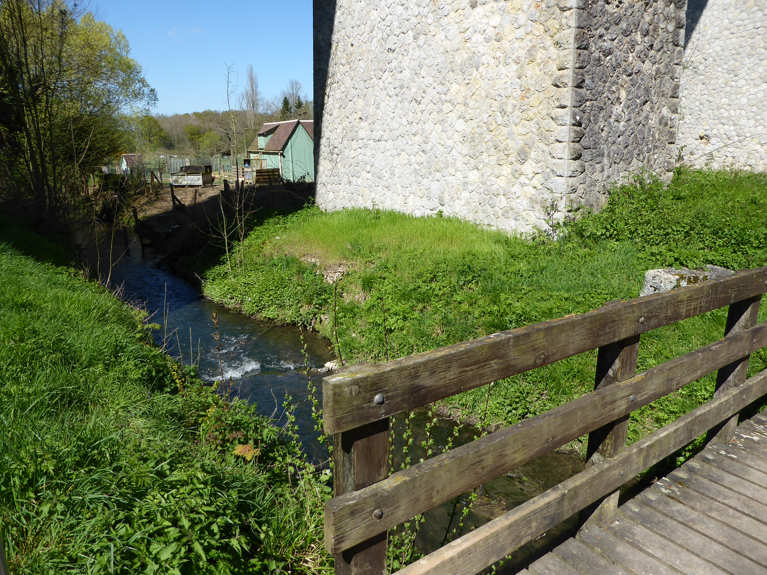 La Roguenette sous le viaduc d'Oisème, Gasville-Oisème, Eure-et-Loir (France).